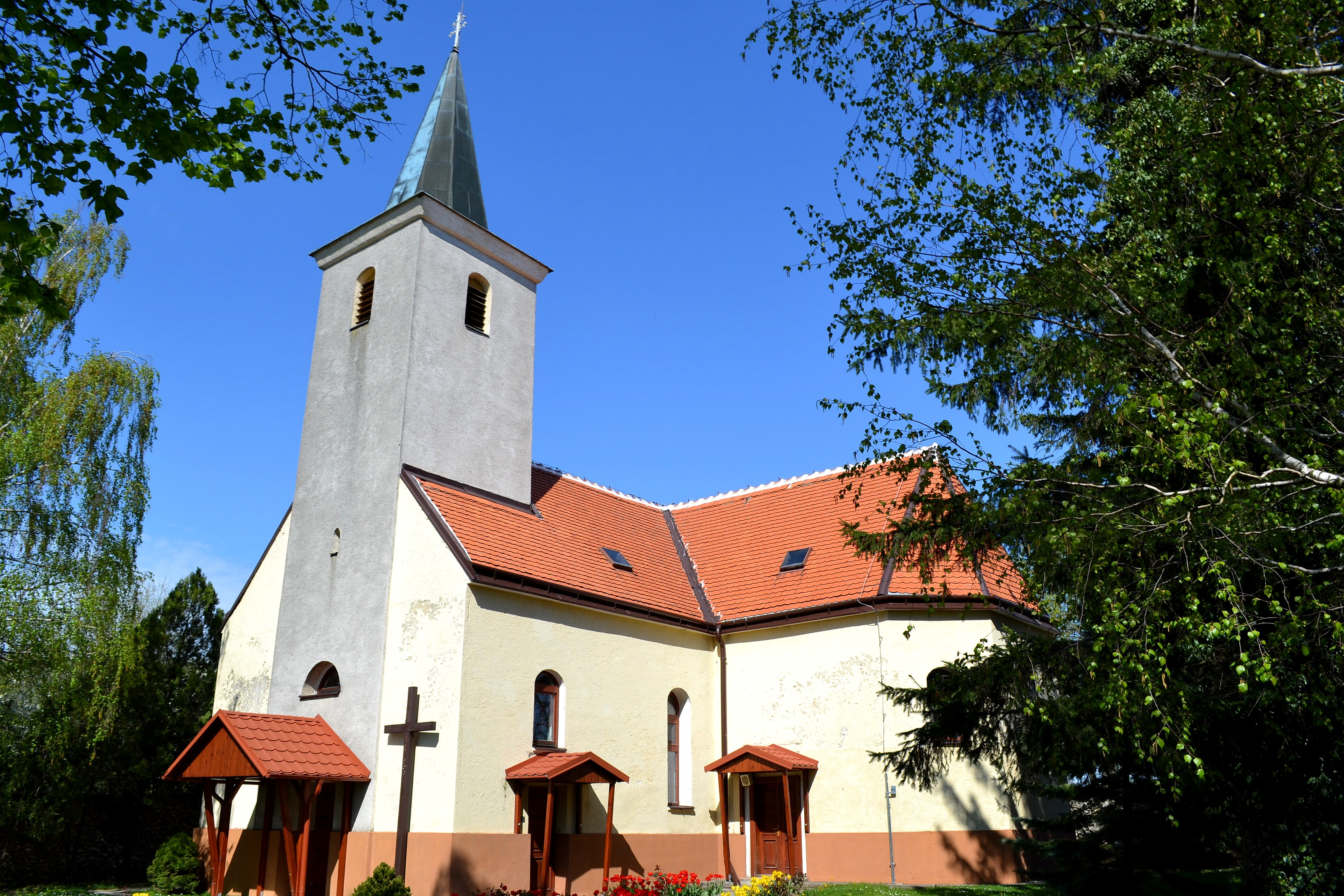 Lošonec (okr. Trnava), Kostol svätej Anny; celkový pohľad